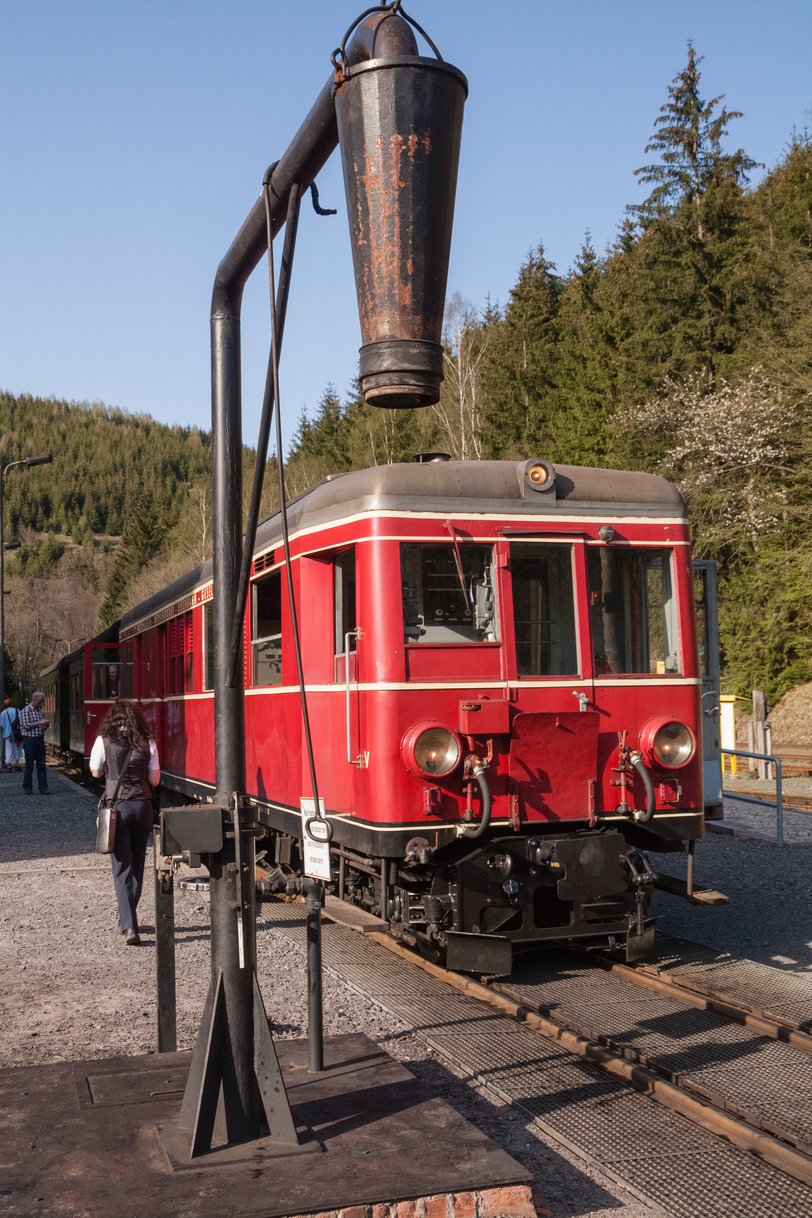 T3 in Eisfelder Talmühle